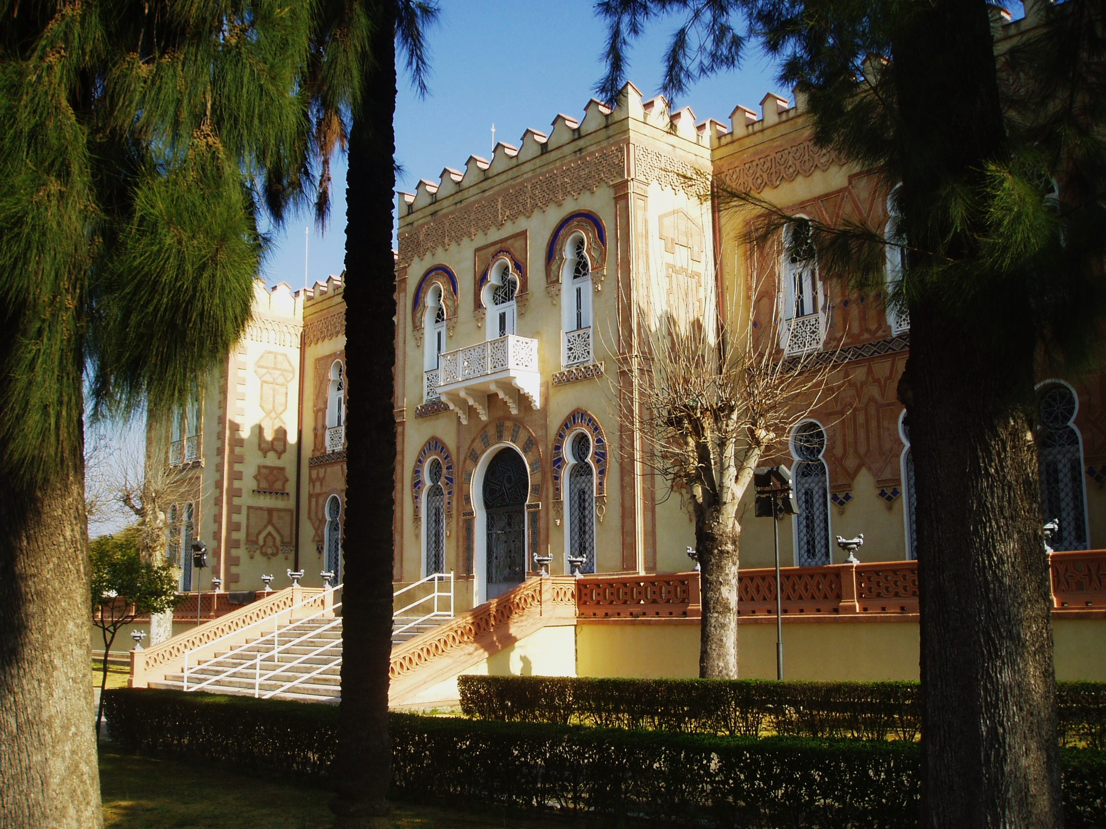 Palacio de Alperiz, antigua casa señorial, hoy residencia de pensionistas, de Dos Hermanas (Sevilla) españa